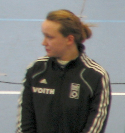 Ricarda Multerer beim Preis der Quadratestadt Mannheim 2013.